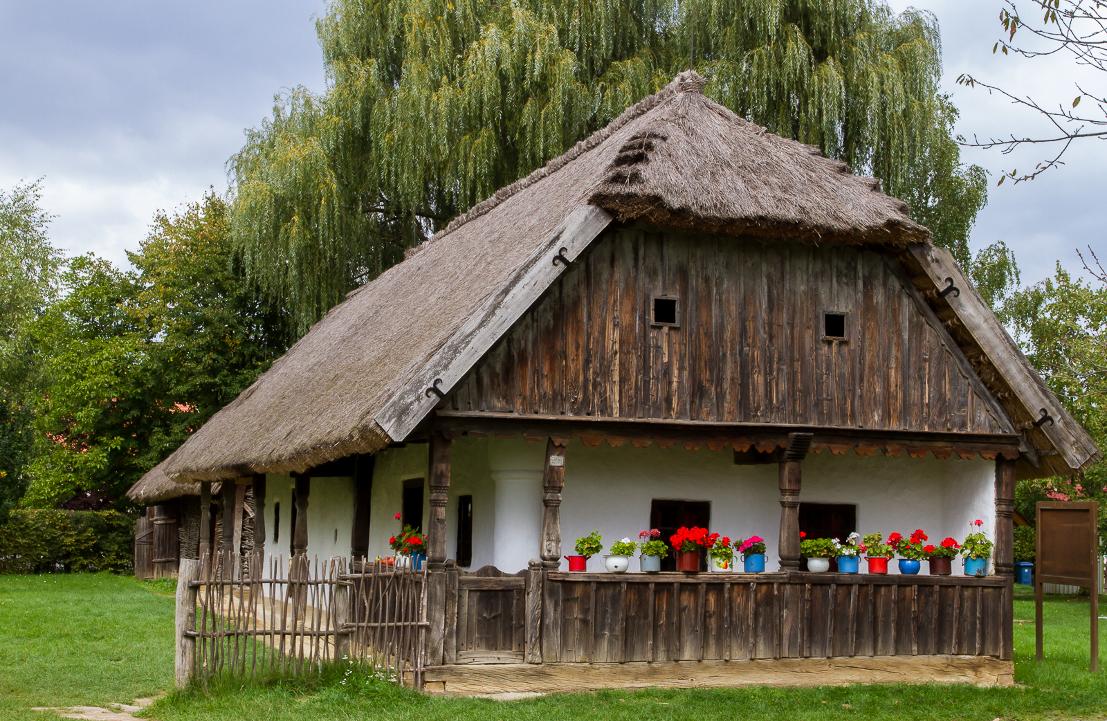 Tájház a szennai falumúzeumban; Szabadtéri Néprajzi Gyűjtemény, Szenna, Rákóczi út 2.